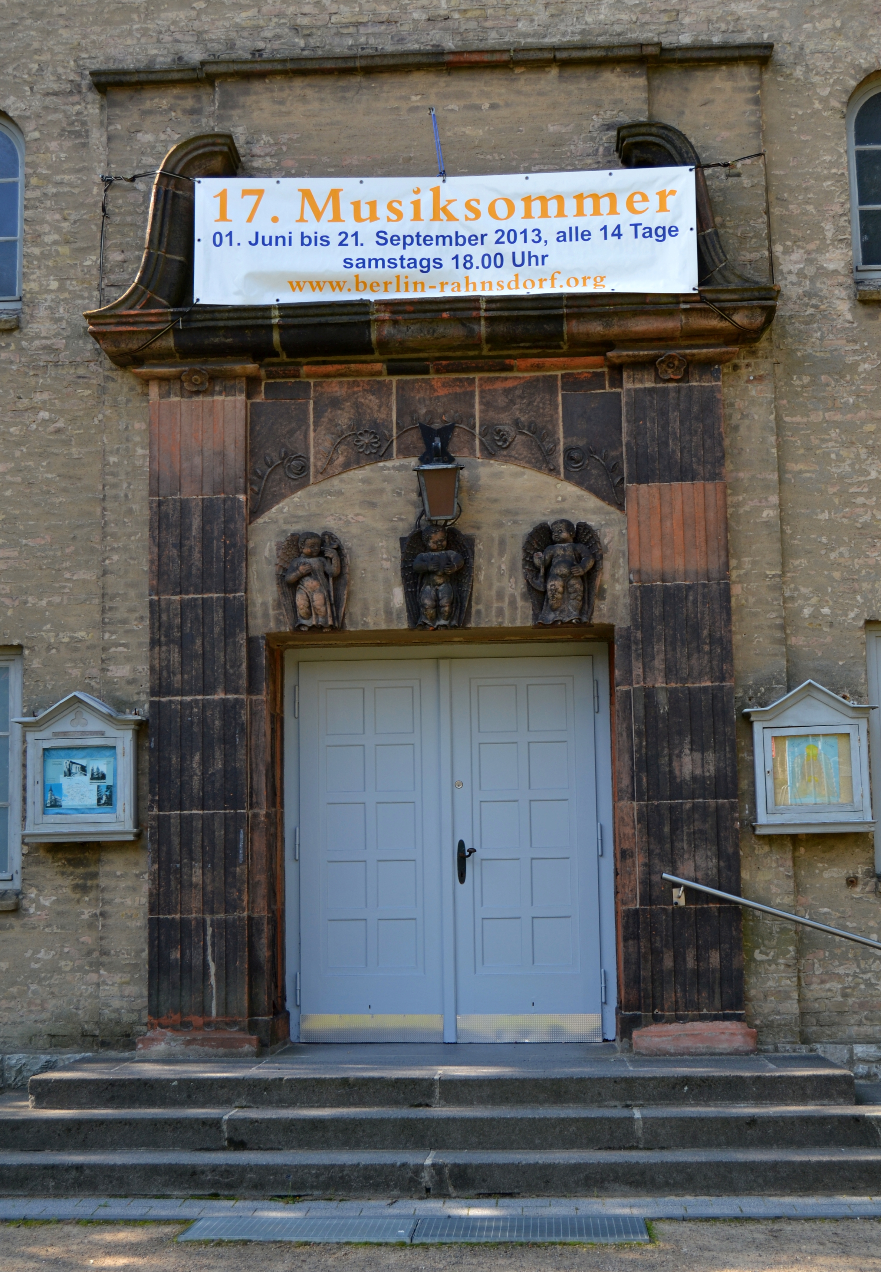 1910–11 von Jürgensen & Bachmann erbaute Taborkirche mit Parkanlage in Berlin-Friedrichshagen; Baudenkmal und Gartendenkmal; Detail: das aus Keramik gefertigte EingangsportalThis is a photograph of an architectural monument.